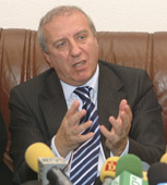 снимка от CSKA.BG с разрешение